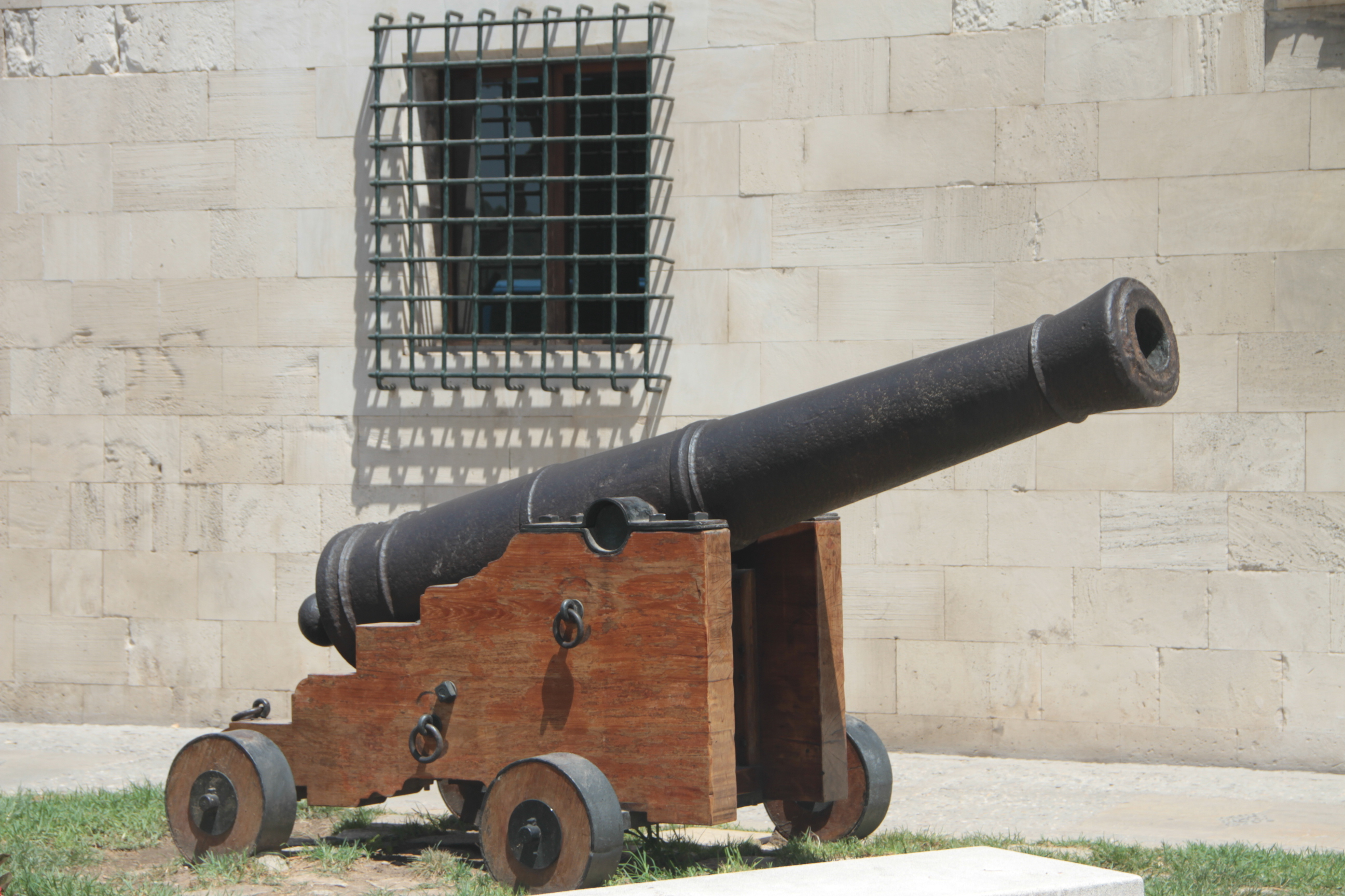 Морський консулат, Пальма, Мальорка.